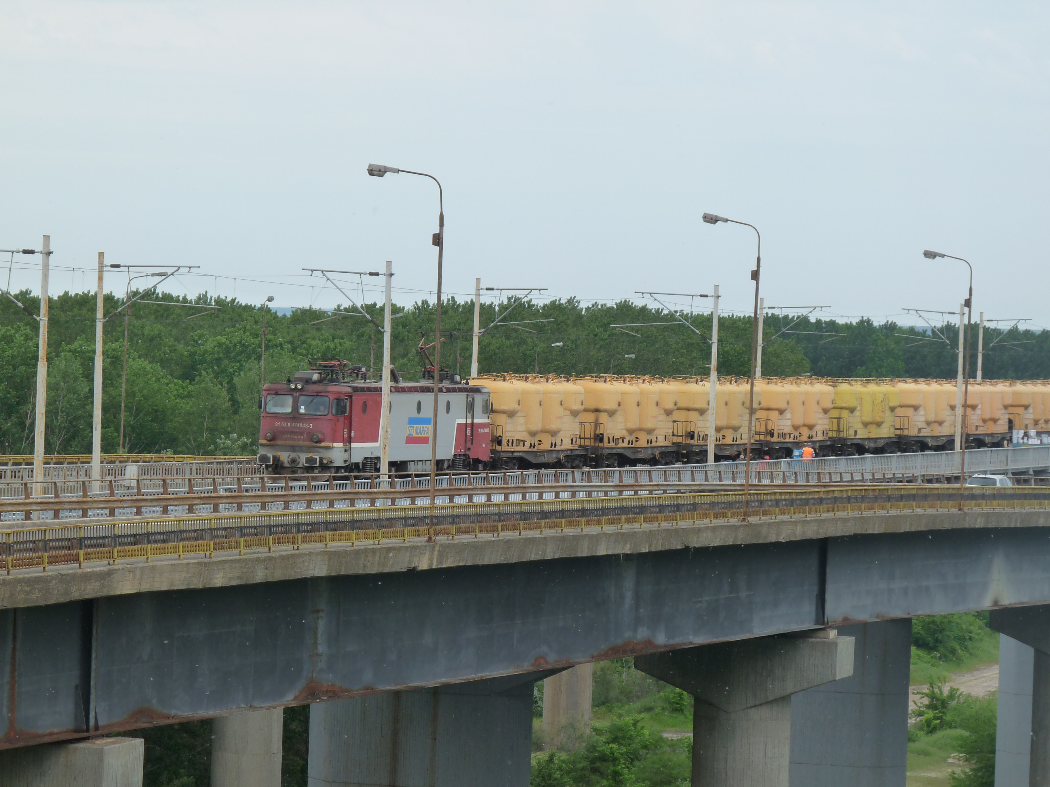 De spoorbrug Cernavodă bij Cernavodă gefotografeerd vanaf de Anghel Saligny spoorbrug